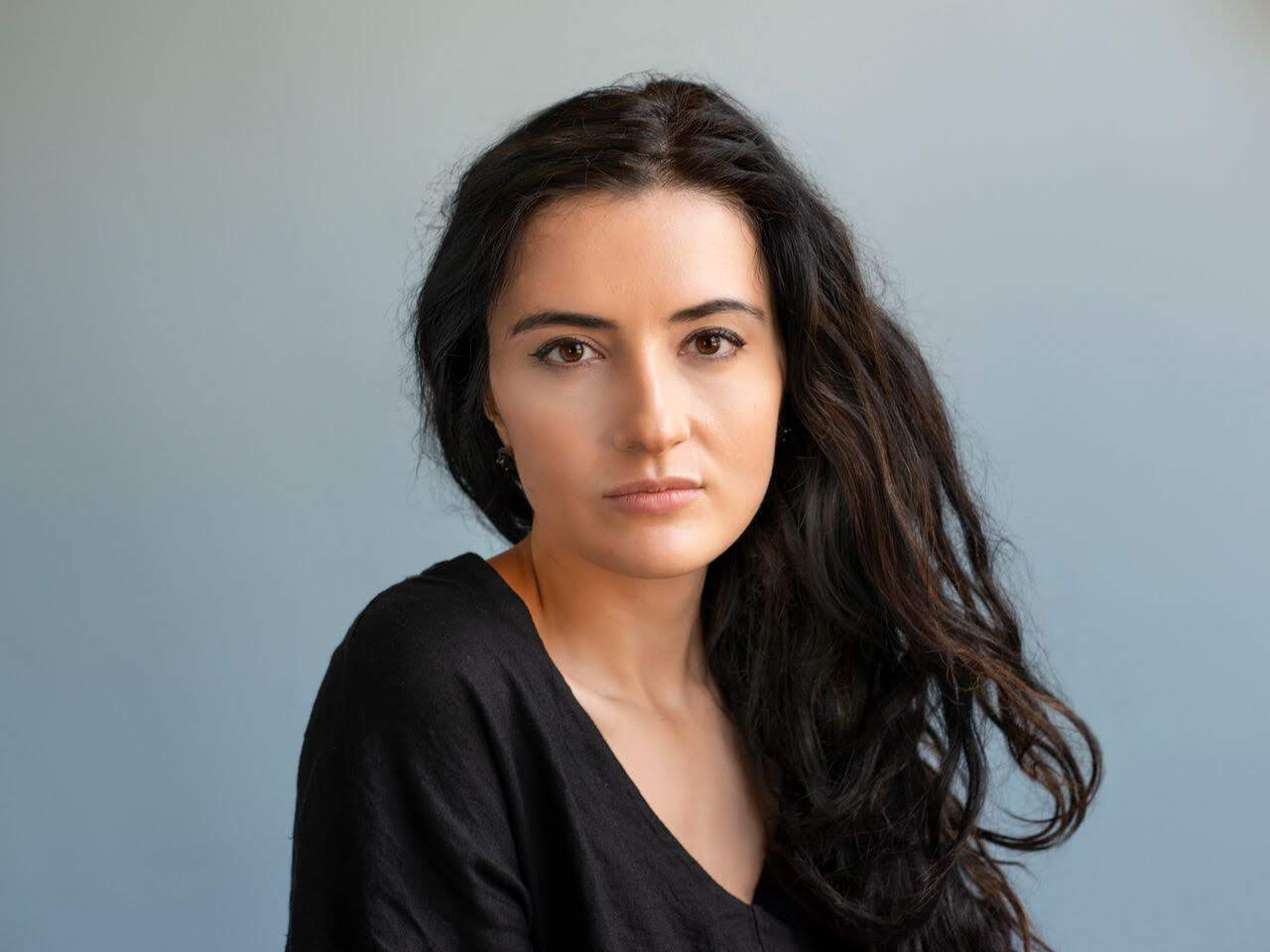 Alisa Ganieva